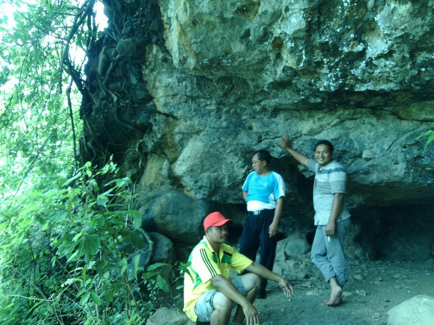 Gua Ngesong